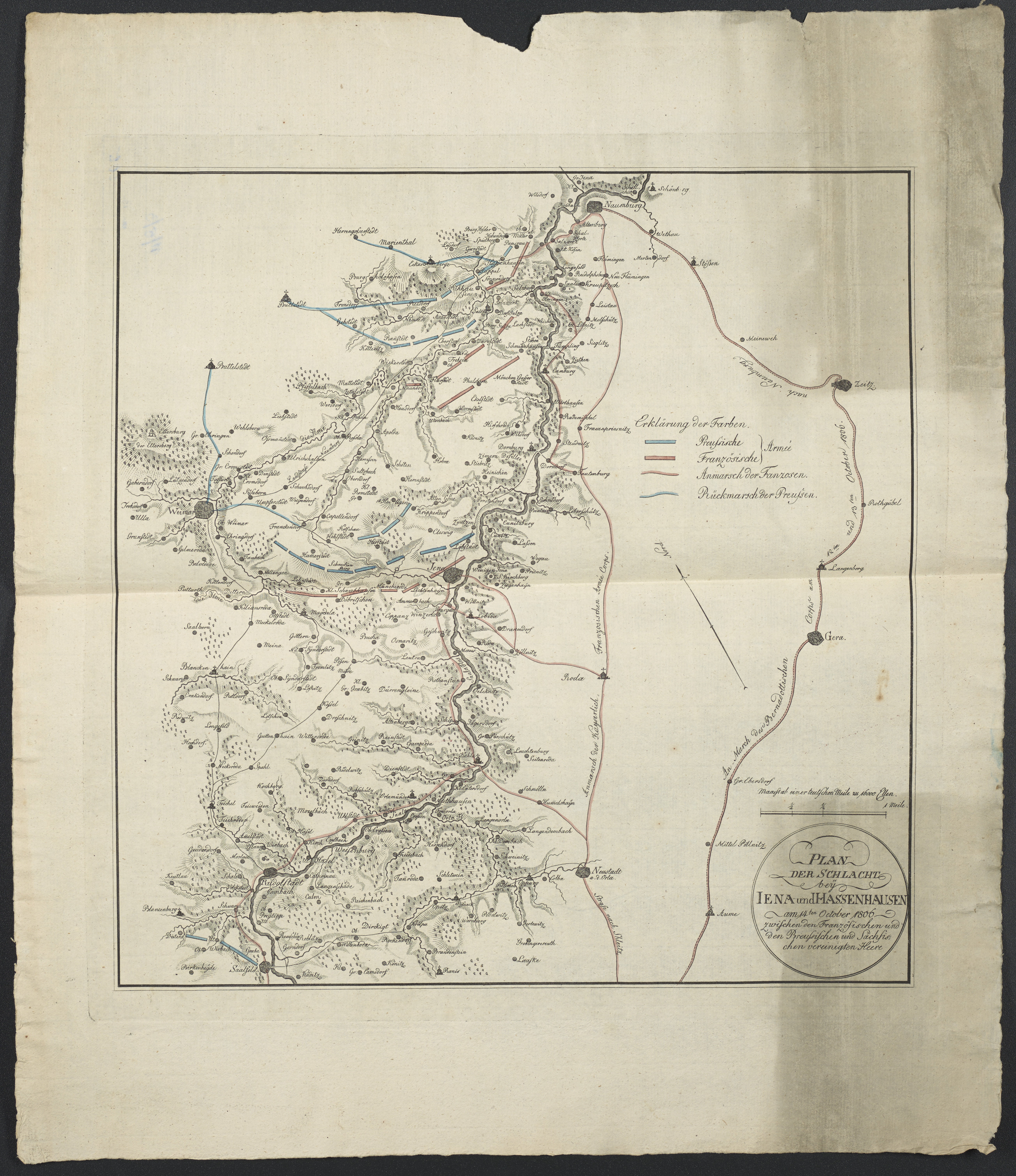 1 Kt. : teilw. kolor. (35 x 36 cm); Koordinaten E 11°14'00"-E 12°09'00"/N 51°11'00"-N 50°38'00"; Maßstab in graph. Form (teutsche Meile). - Titel und Maßstab unten rechts. - Stellungen der Truppen und Marschrouten kolor. - Erkl. der Farben in Kt.-Bild. - NNE oben. - Relief: Bergschraffen